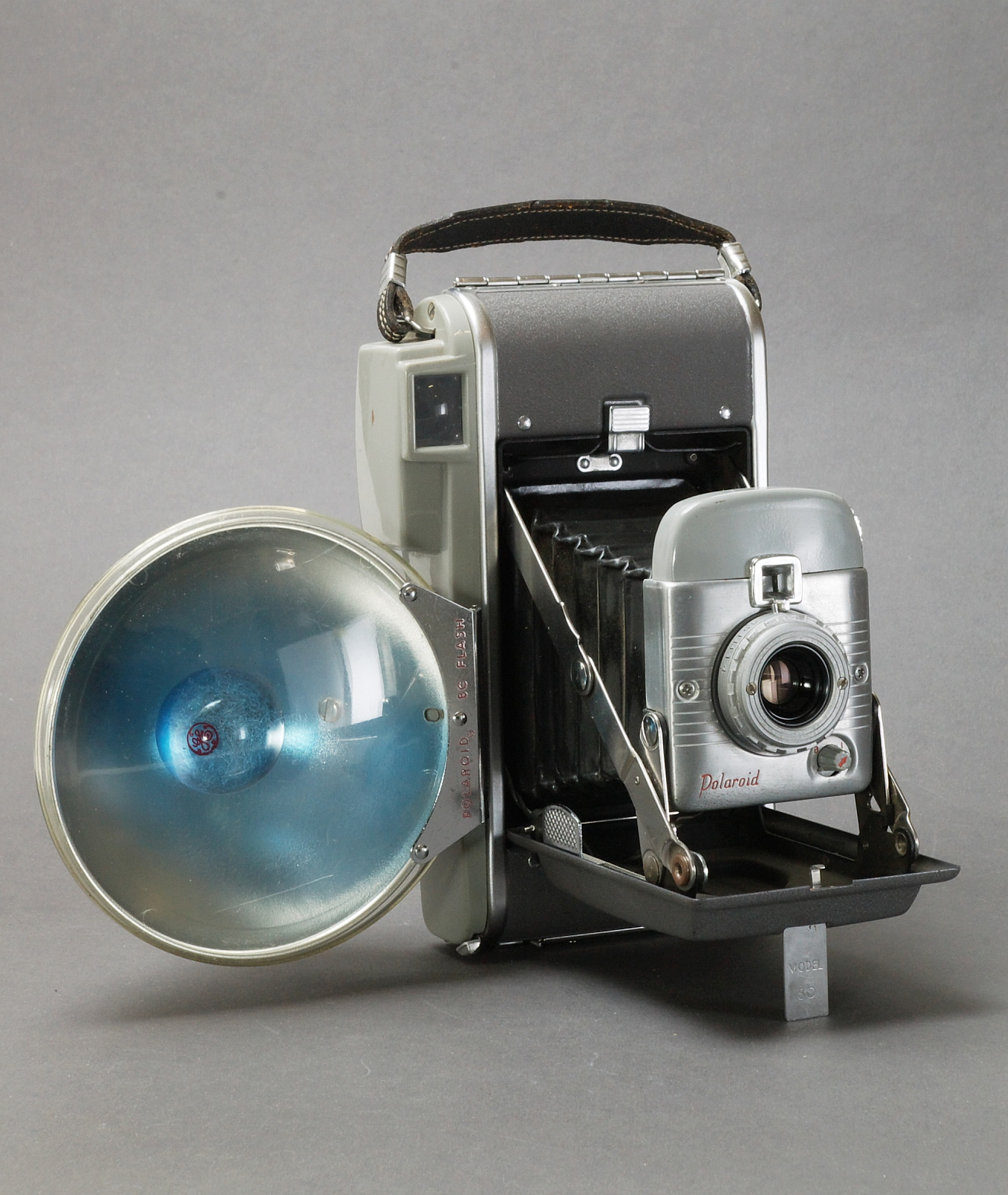 Polaroid Land camera model 80, mit Polaroid Blitz model 281